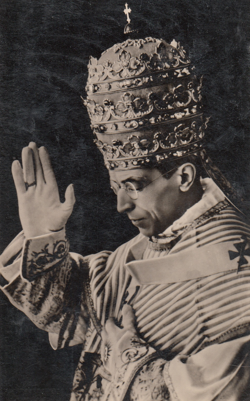 XII. Pius pápa (Eugenio Pacelli). Postcard.